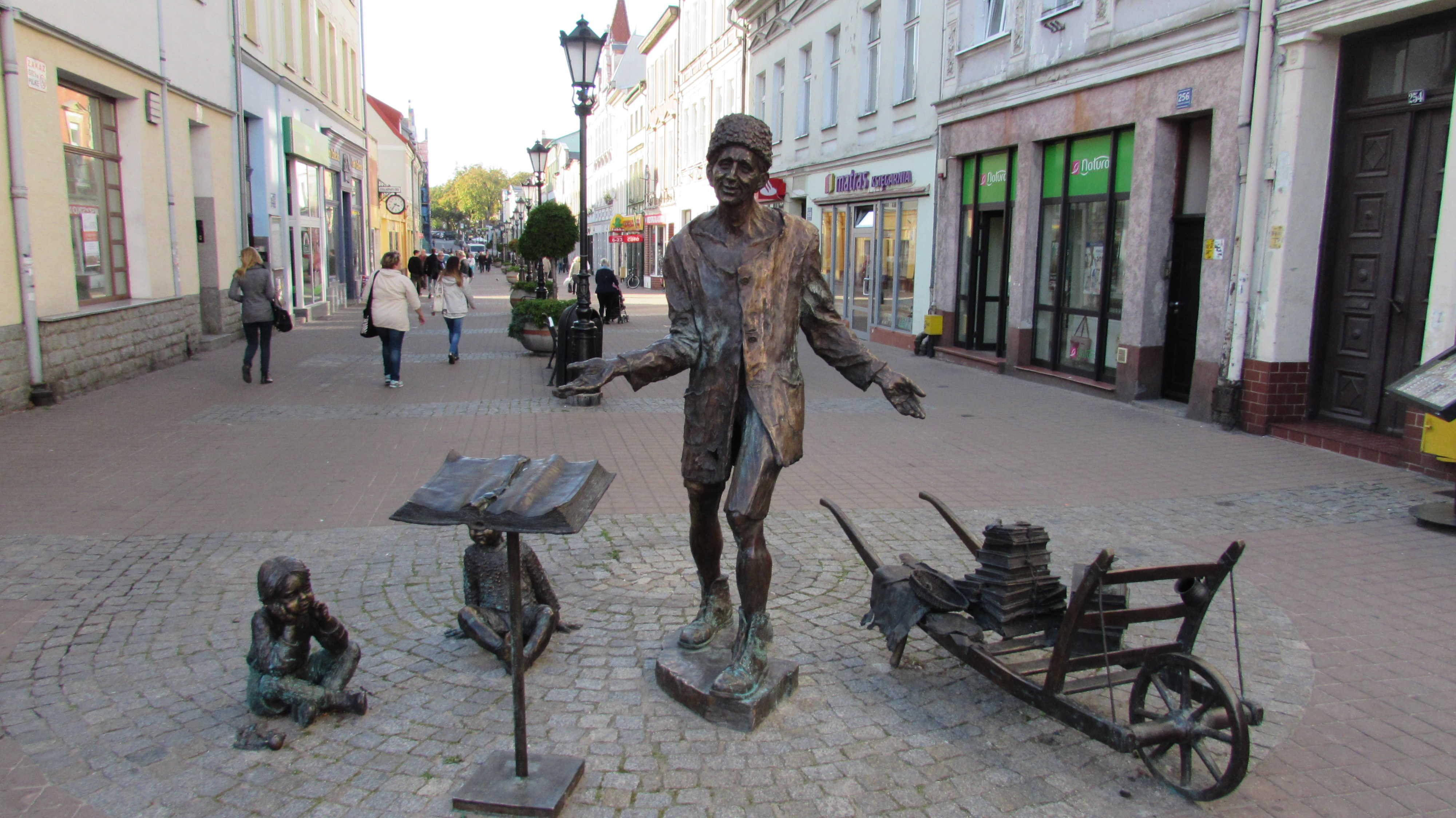 Wejherowo Skulpturen